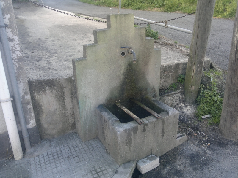 Fonte na Eira Vella (A Coruña)